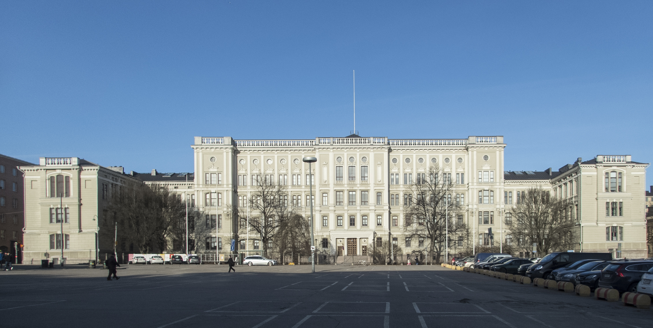 Gamla Tekniska Högskolan, Helsingfors. Byggnadsår 1877 Arkitekt Frans Anatolius Sjöström. Senare påbyggnad